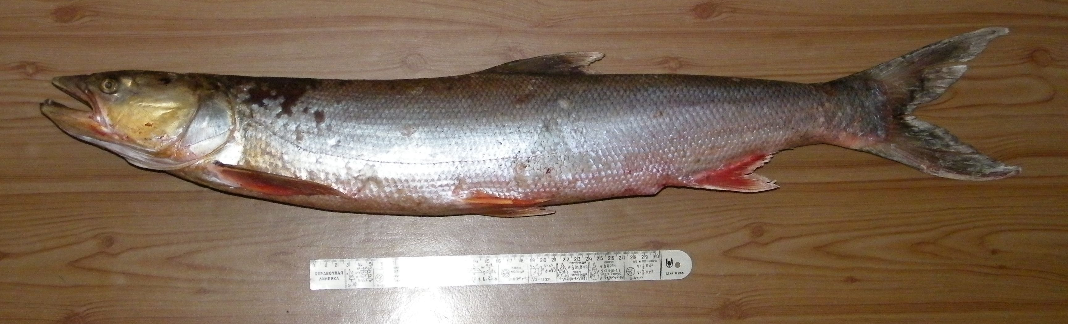 Желтощёк (Elopichthys bambusa)